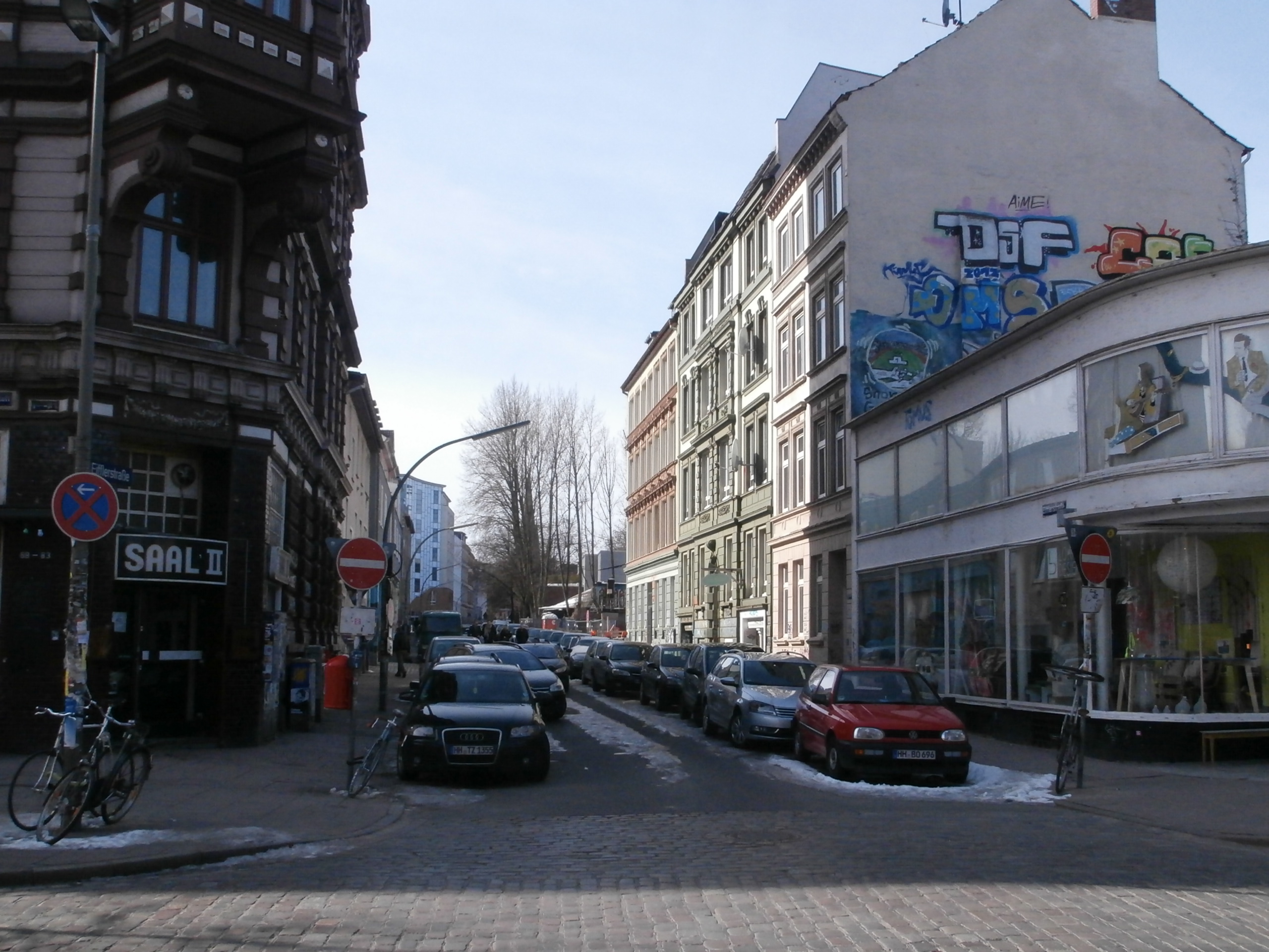 Strasse in Hamburg-Sternschanze